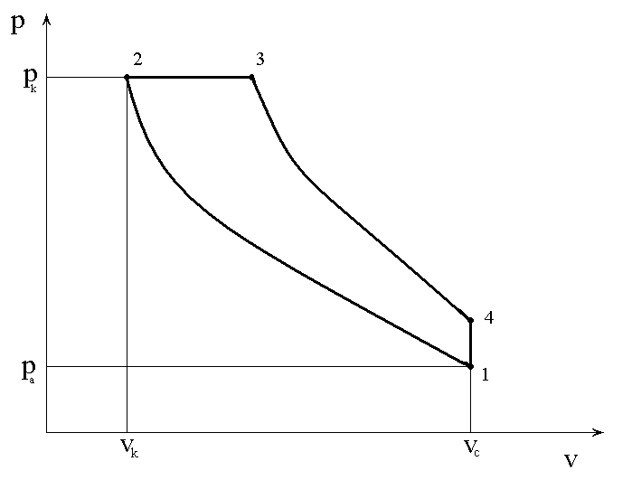 Two stroke diesel process diagram